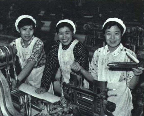 1964-05 1964年 北京第二棉纺织厂陈素芝 于世卿 王凤霄